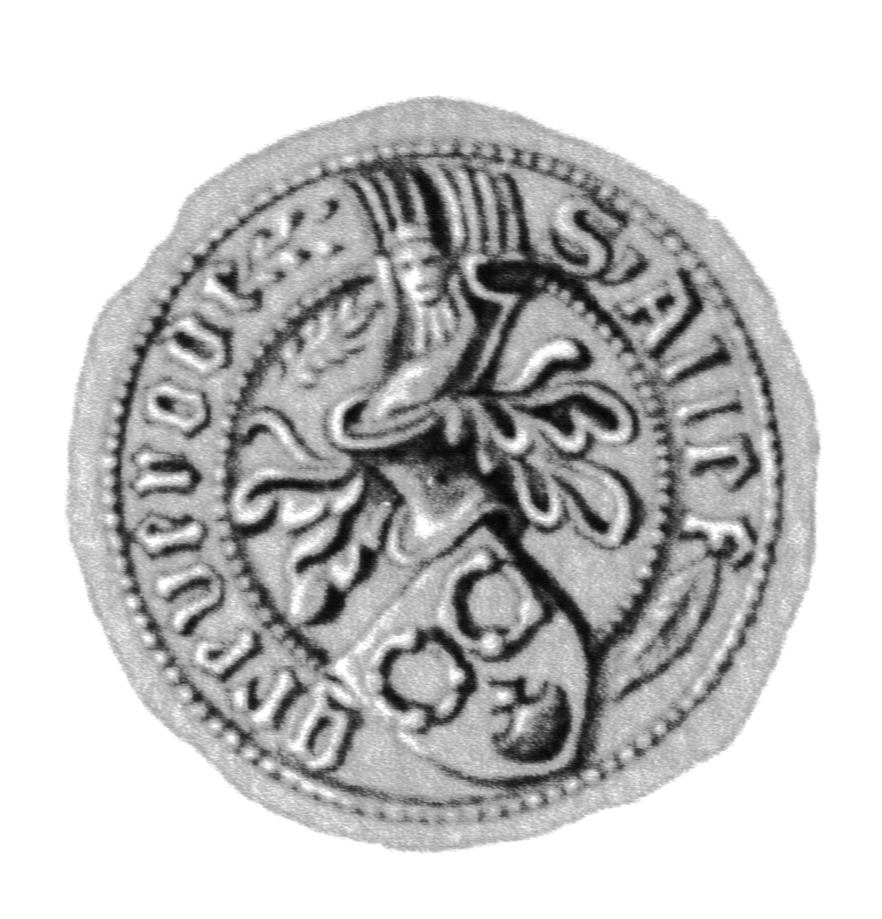 Siegel des Ratsmannes Adolf (Allef) Grevero(a)de. Das Siegel stammt aus der Zeit um 1456. Siehe Emil Ferdinand Fehling: Lübeckische Ratslinie, Nr. 538 (Adolf Greverade).